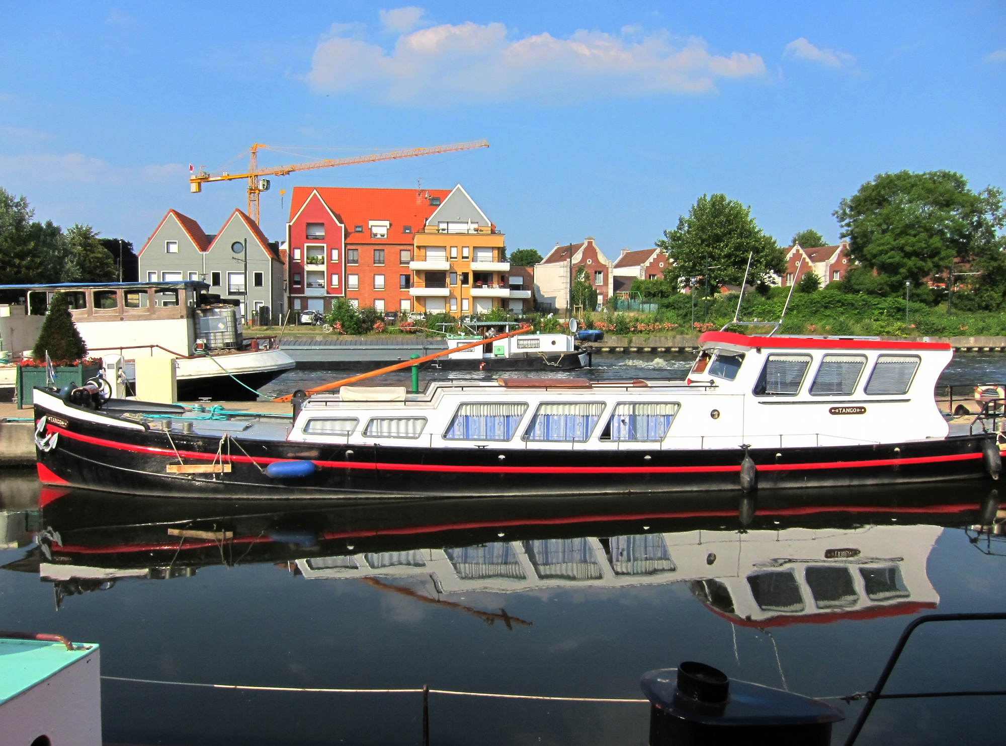 Le port de Wambrechies (Nord).